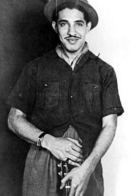 El músico de Brasil Dorival Caymmi en Rio de Janeiro en el año 1938.